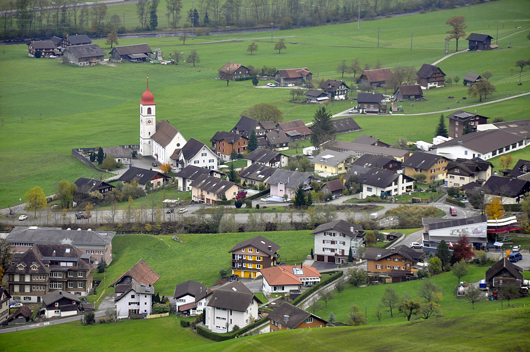 Dallenwil NW